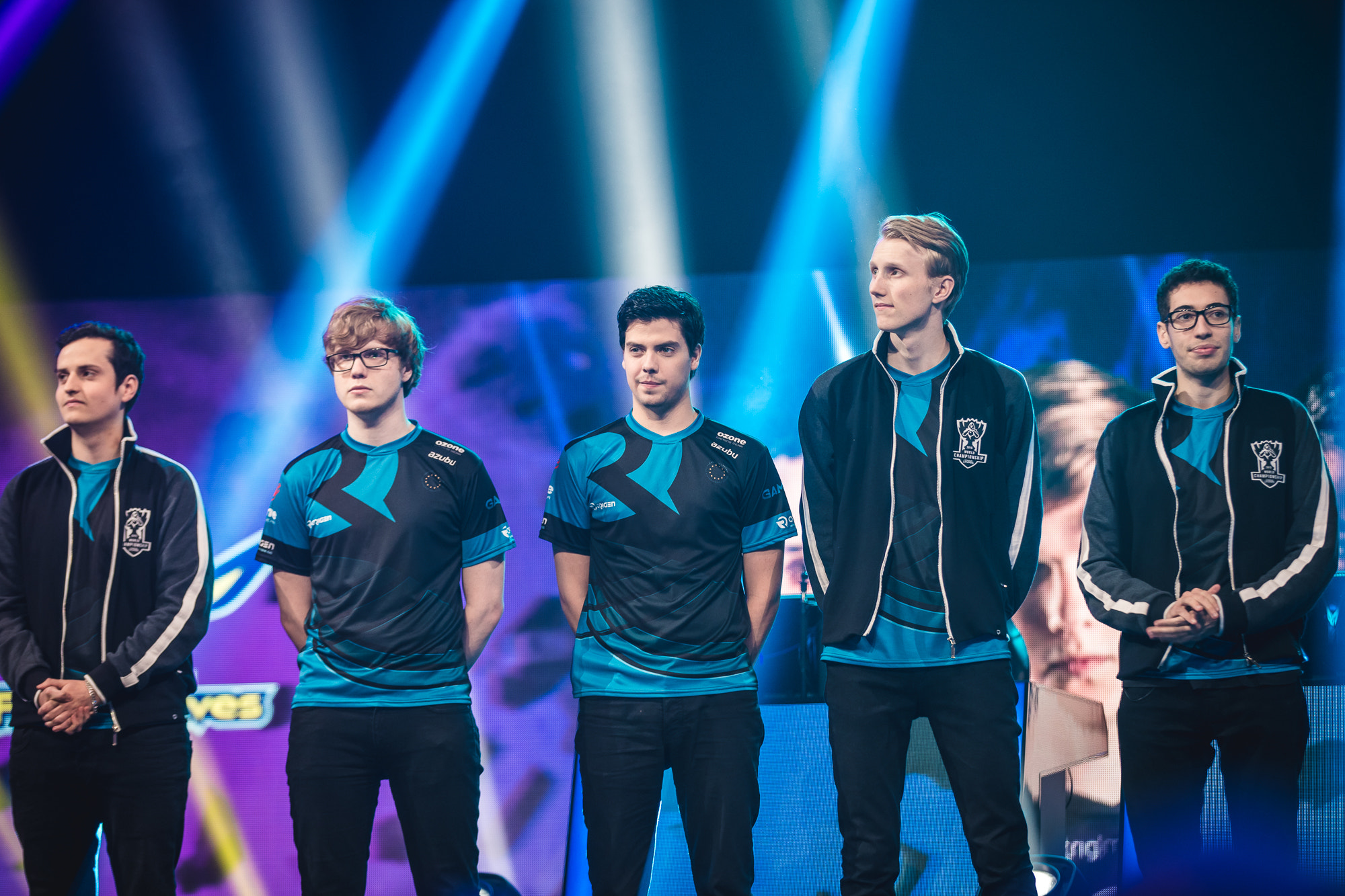 500px provided description: 1cun0140 Jpg [#lol ,#London ,#S5 ,#teamchina]